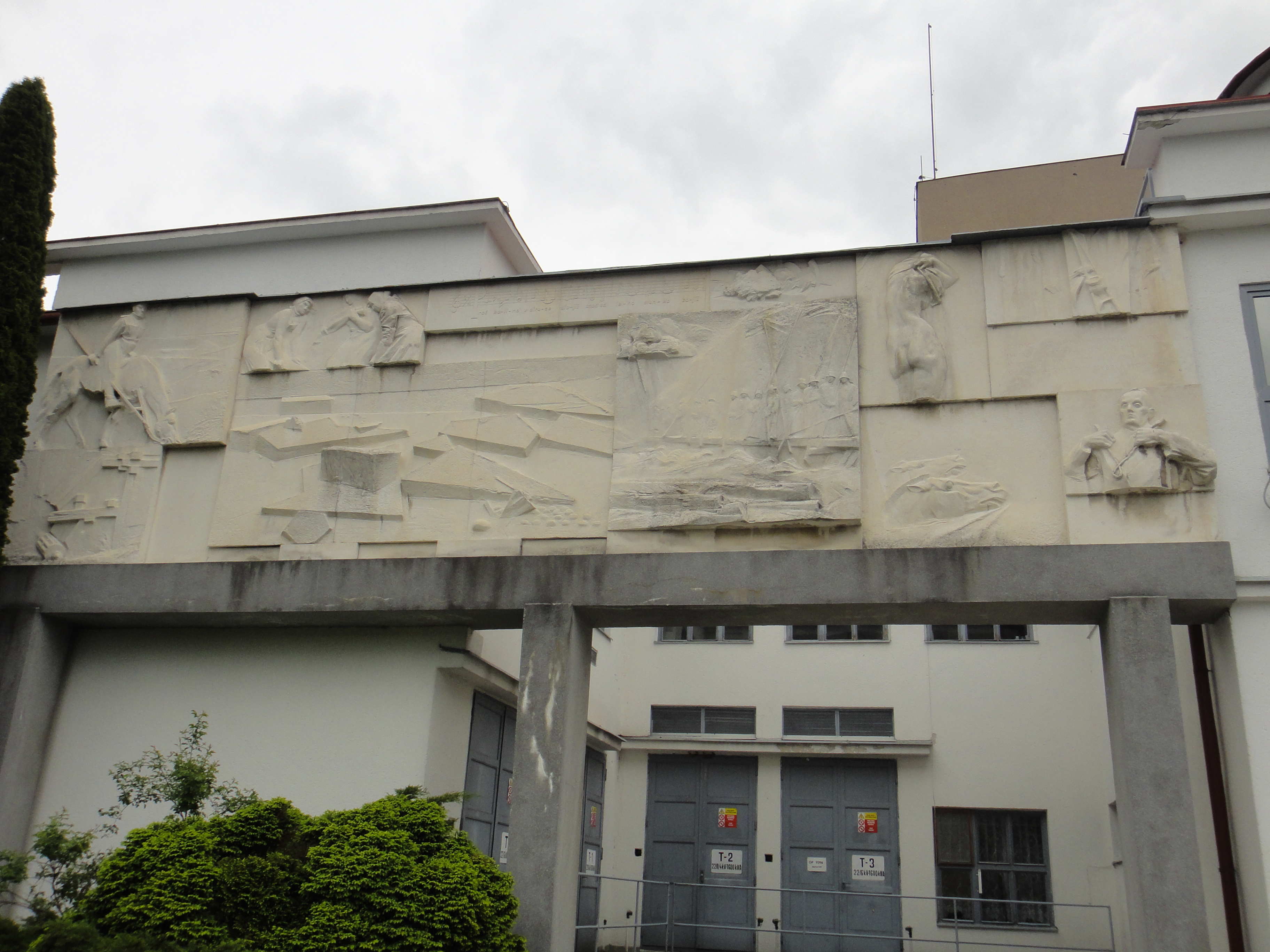 Vodárna, Podhradí (Vítkov). Monumentální reliéf Vincence Makovského z cyklu Voda v našem životě